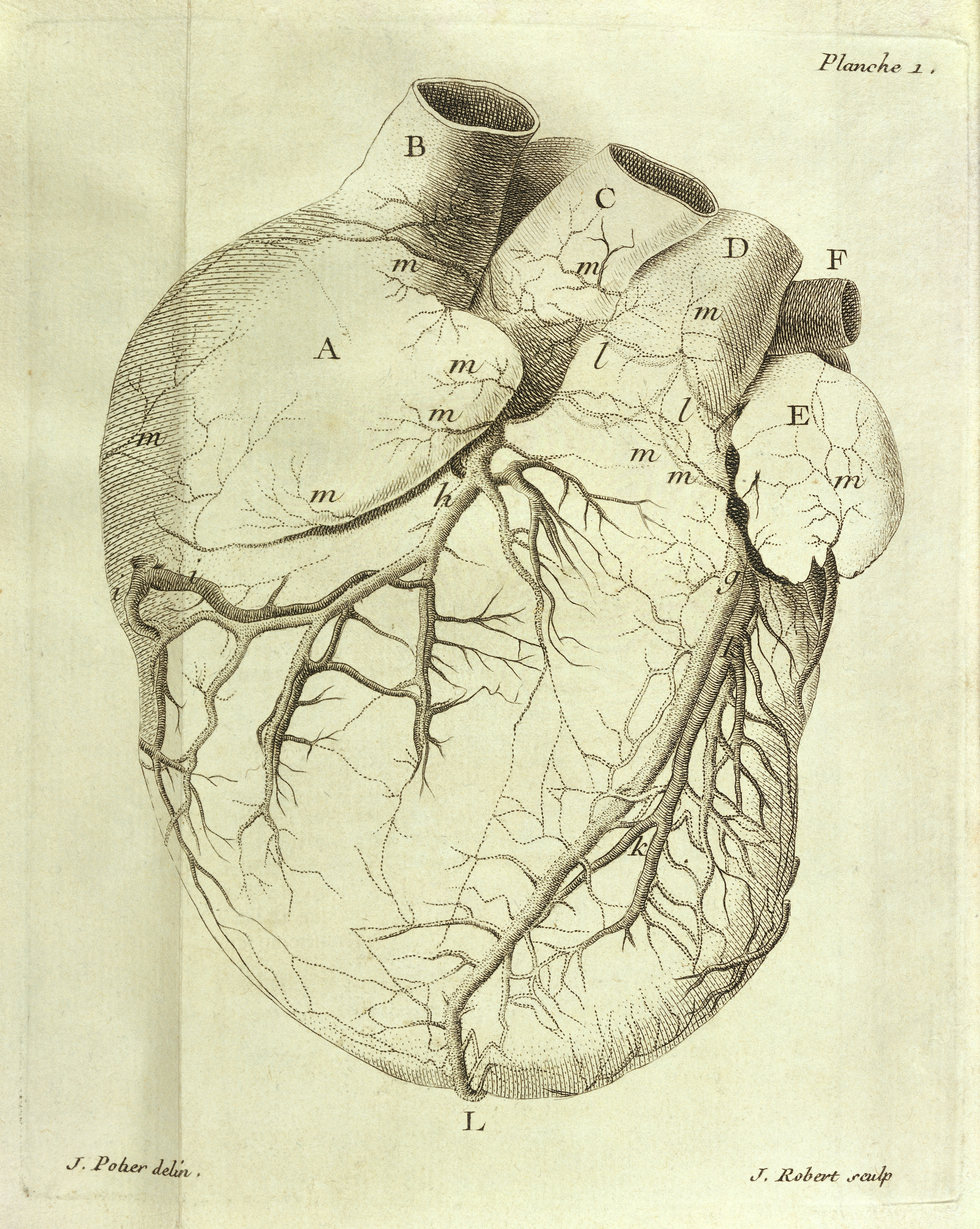 SENAC,Jean Baptiste,M. (1693-1770}. M. J.B. Senac, Traité de la structure du coeur, de son action, et de ses maladies.Paris : J. Vincent, 1749. Tab. 1: Human heart Rare Books Keywords: 1663-1770; Heart; diseases; senac, *jean baptiste; epb /c 47751